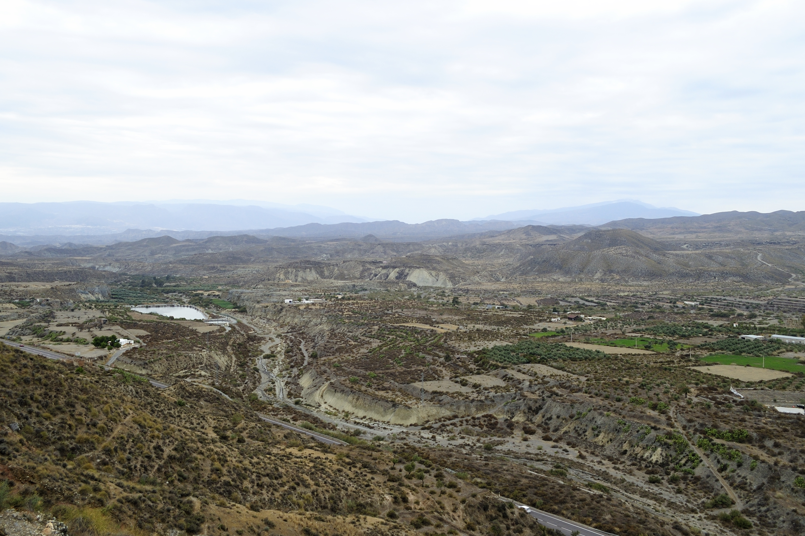 Desierto de Tabernas This is a photography of a Site of Community Importance in Spain with the ID: ES0000047. Natura2000 entry, EEA entry